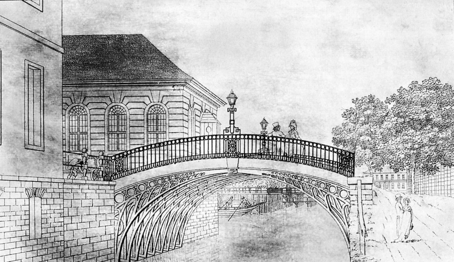 Eiserne Brücke über den Spreekanal in Berlin